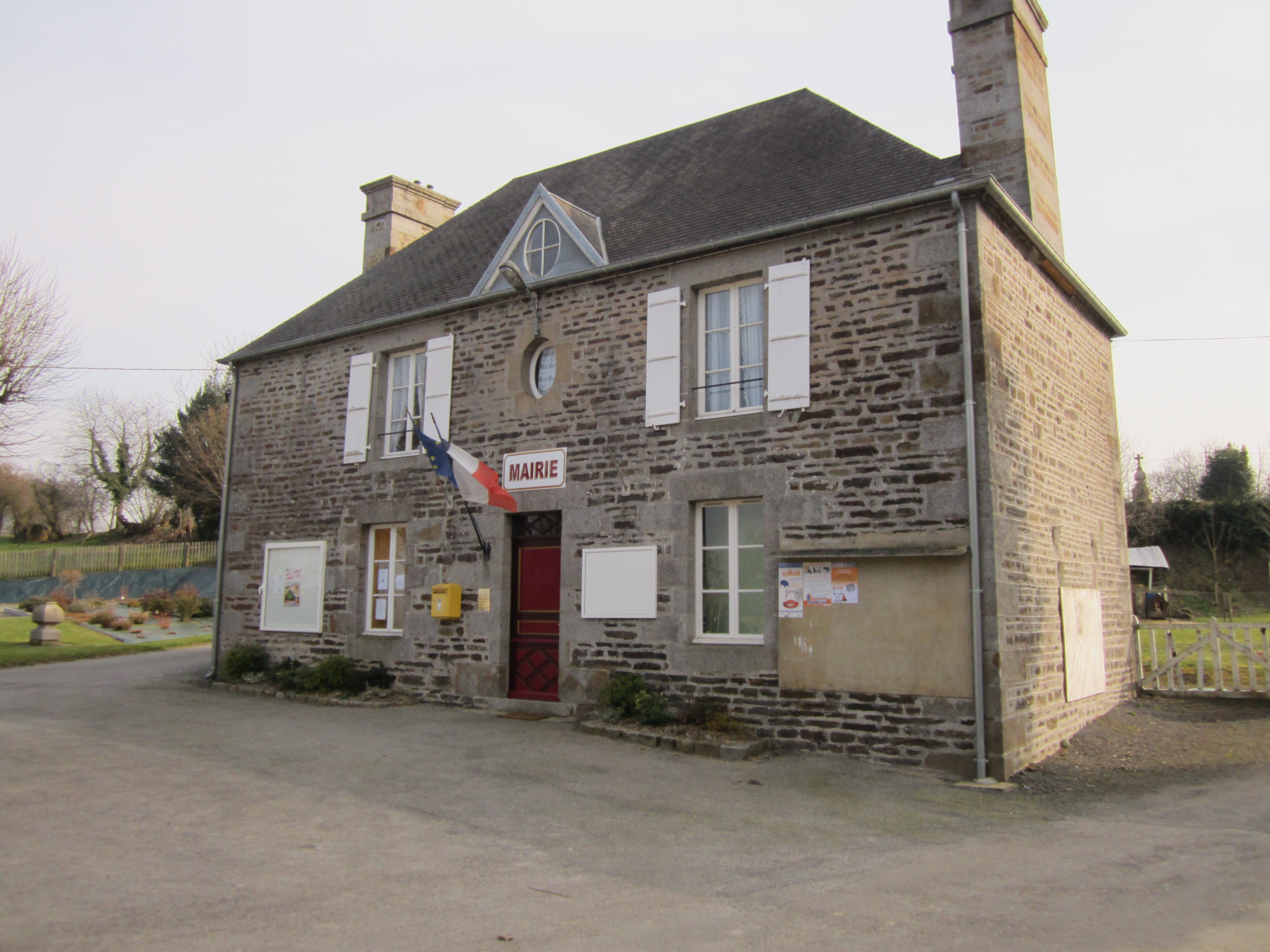 Mairie des Cresnays, Manche